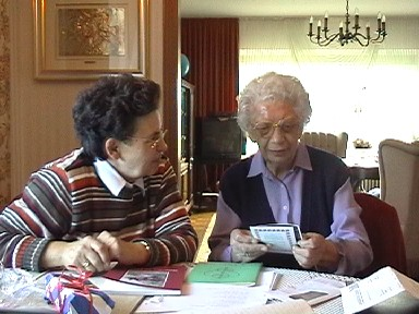 Seeltersk: Margaretha Grosser un Gesine Lechte baale uur hiere Geschrifte